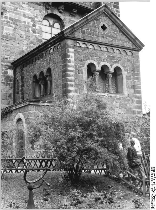 Eisenach, Wartburg, "Ritterbad" ADN-ZB Ludwig-4.8.89-mx Bez.Erfurt: "Ritterbad" auf der Wartburg"-Das Ritterbad "auf der Wartburg in Eisenach ist das letzte Bauwerk der Burg, das jetzt wieder der Öffentlichkeit zugänglich gemacht wurde. Das Bad der großherzoglichen Familie war 1889-1890 nach Plänen des Wartburgerneuerers Hugo von Ritgen, er hatte bis 1889 mehr als vier Jahrzehnte den Wiederaufbau geleitet, errichtet worden.